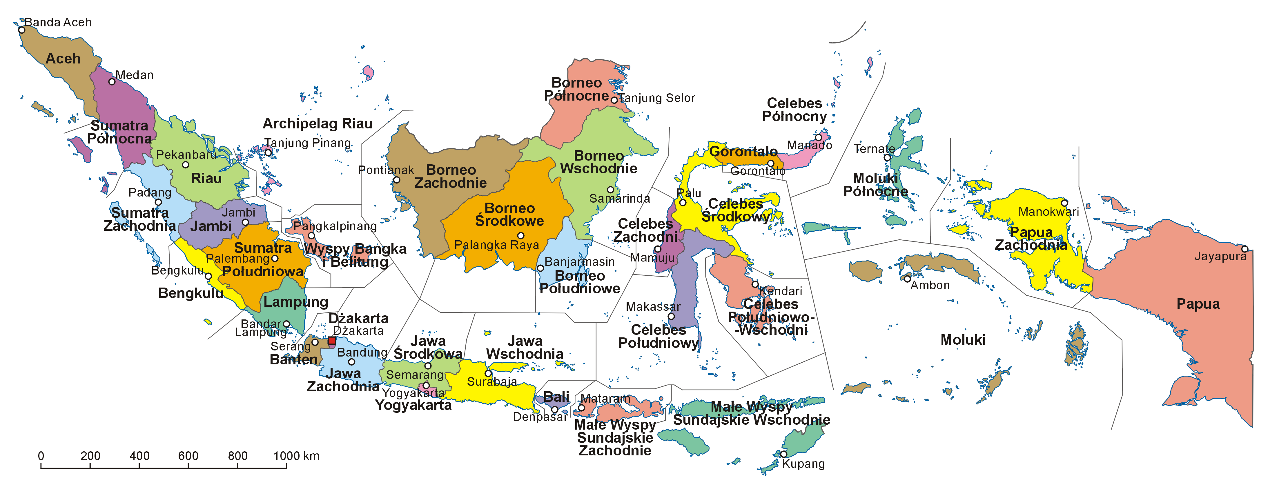 Mapa administracyjna Indonezji. Autor: Aotearoa